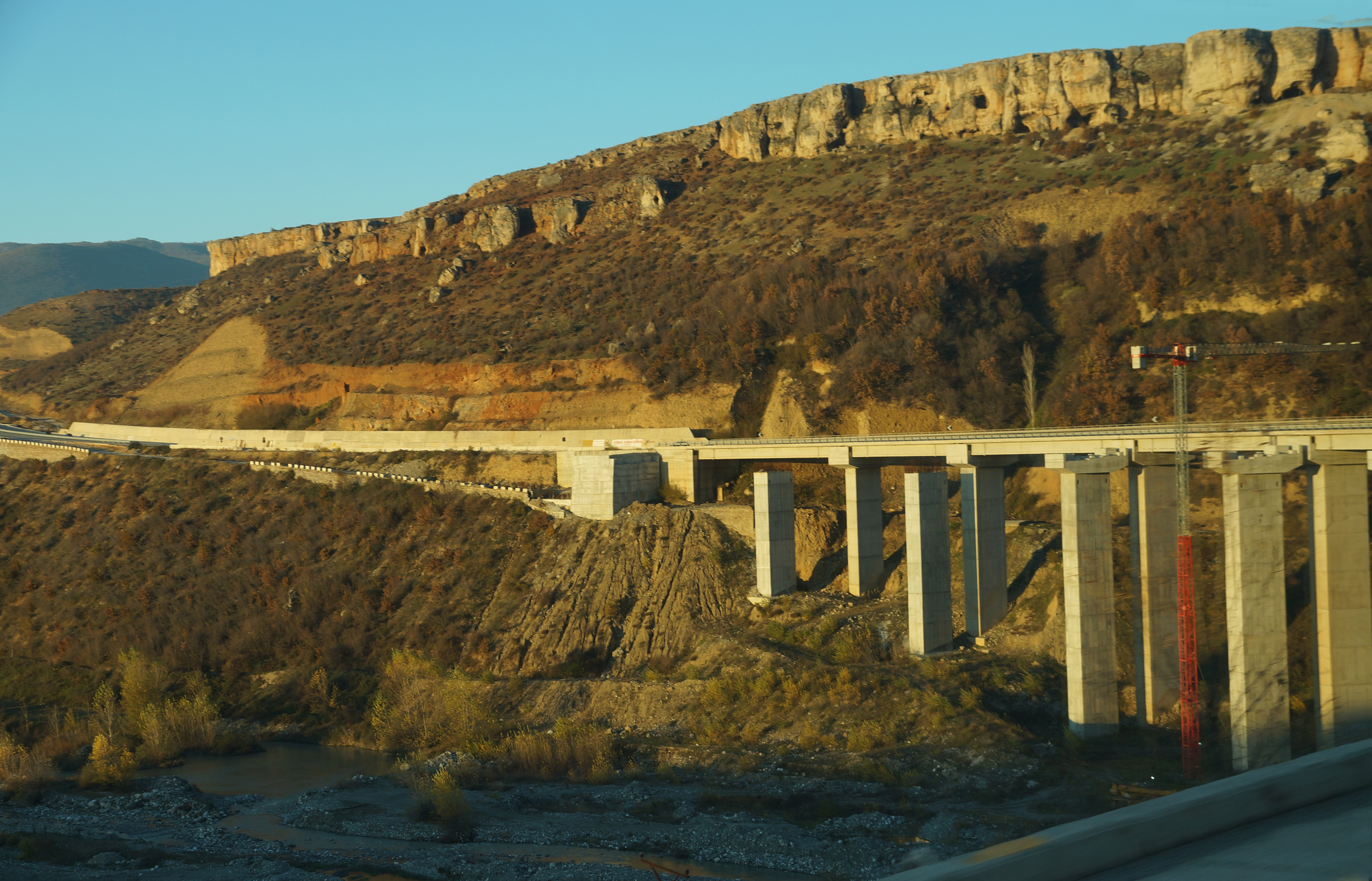 Bridge of Rruga e Kombit in Kukës, Albania